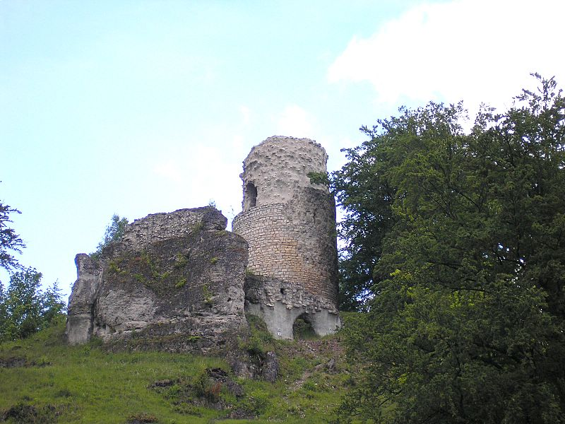 Burg Schenkenstein (Ostalb). Nahaufnahme mit Burgfelsen und Bergfried.